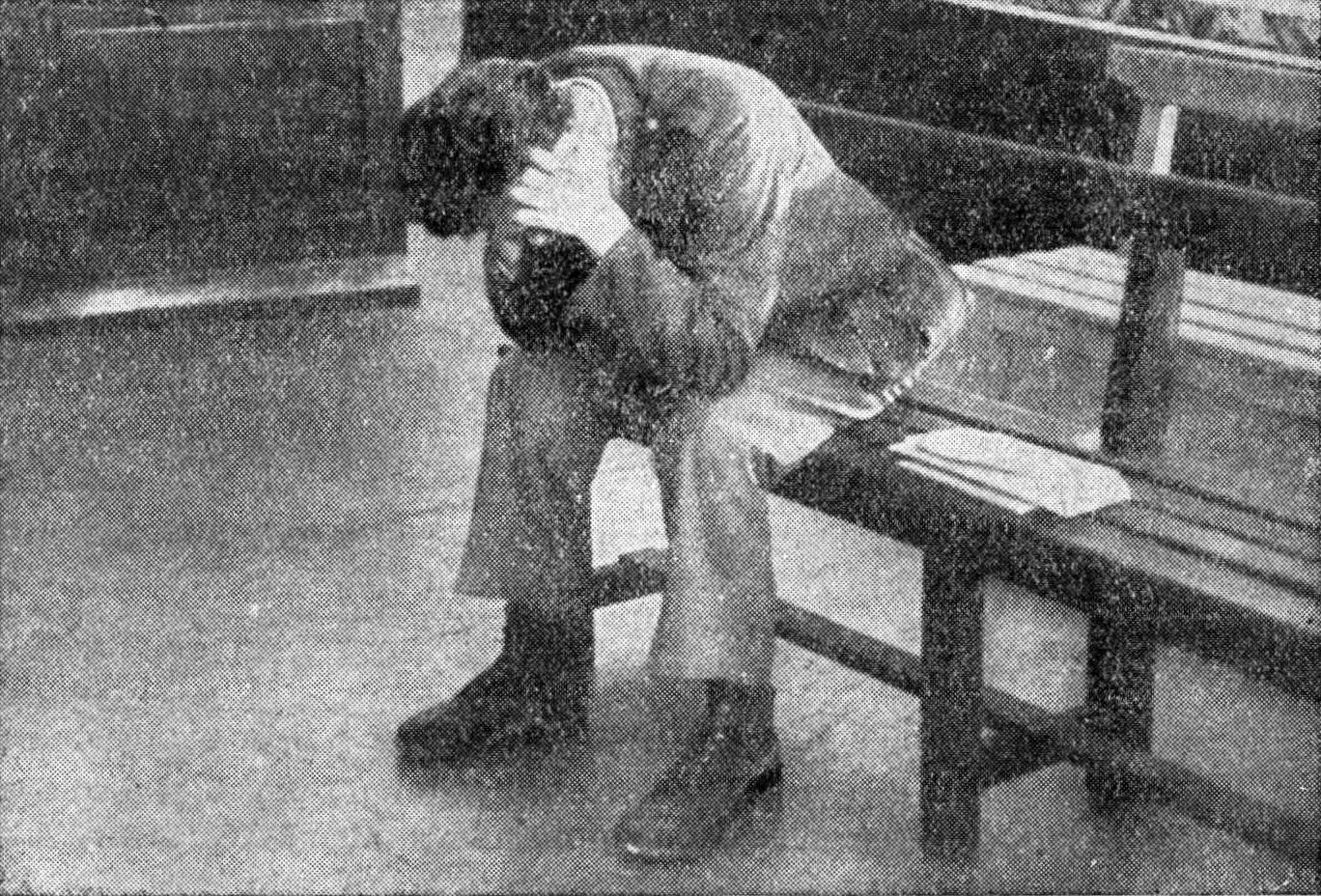 Srpskohrvatski / српскохрватски: Draža Mihailović na optuženičkoj klupi.